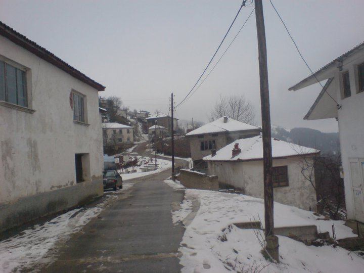 Зимен пейзаж от село Гърнати, Област Смолян.